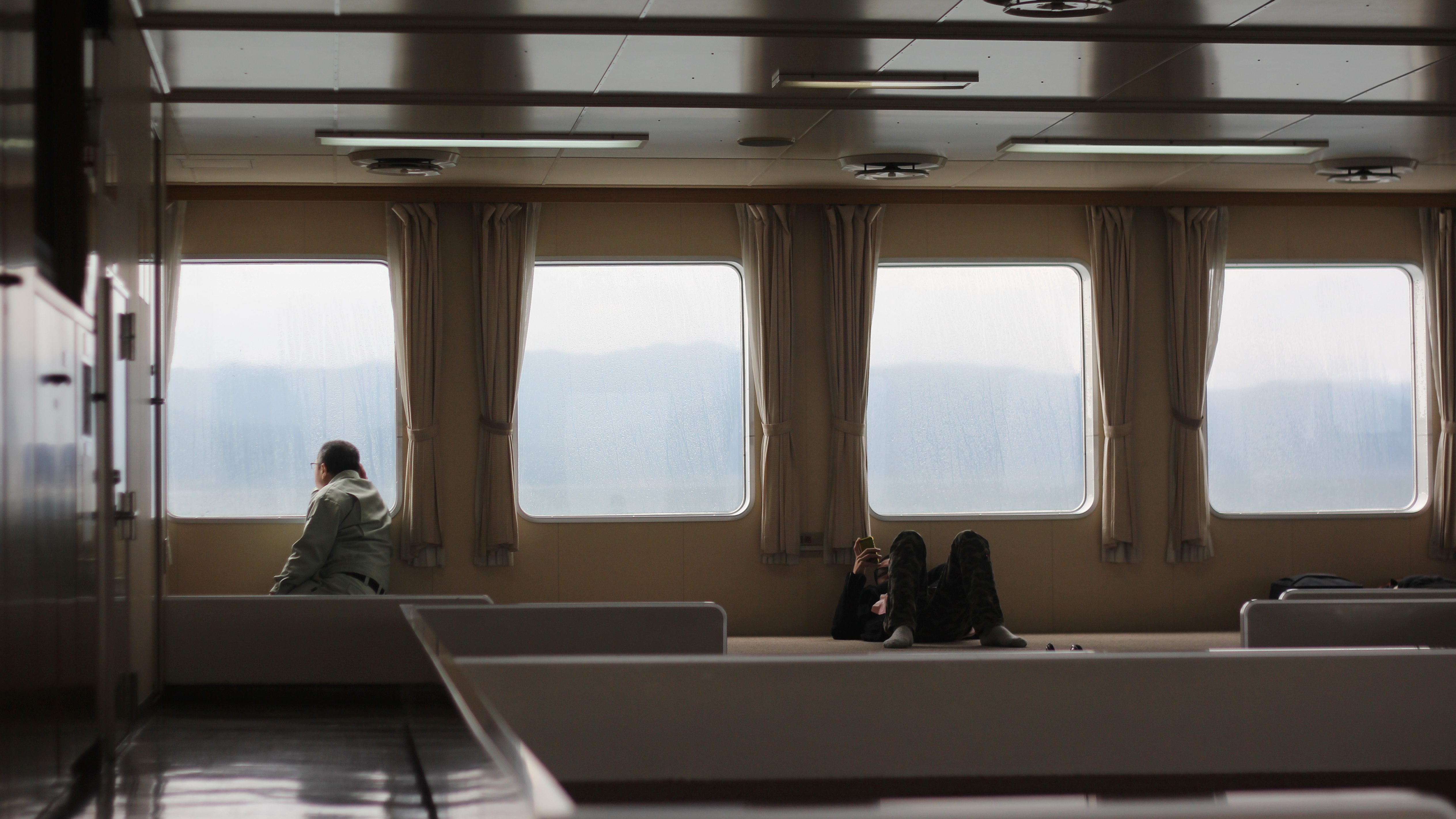 Japanese passenger ferry between Beppu (Kyushu) and Yawatahama (Shikoku).